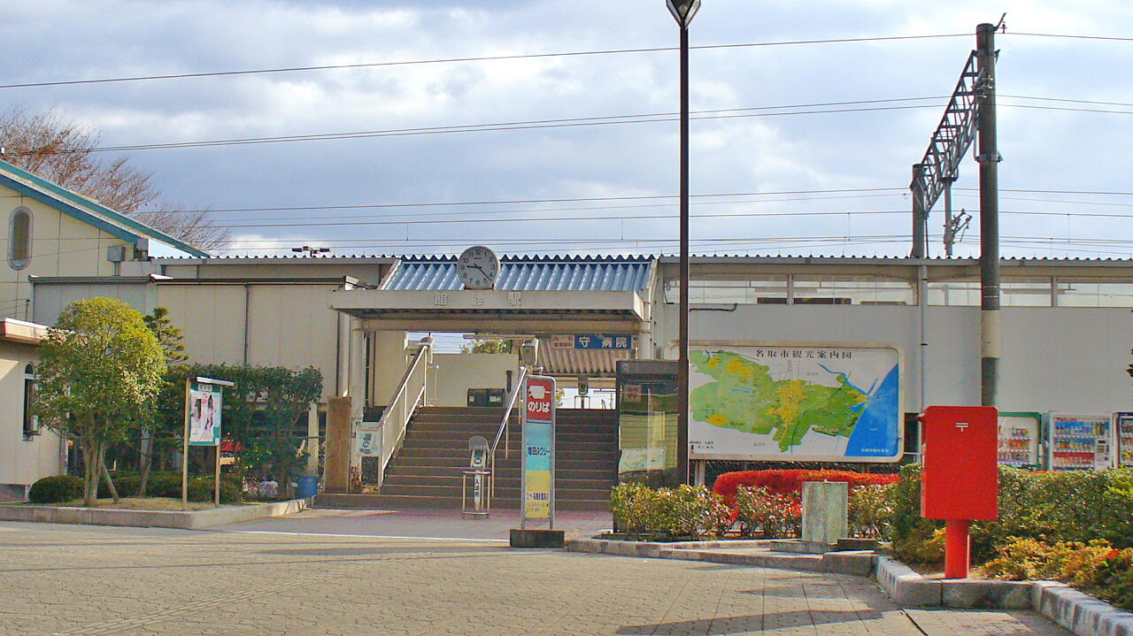 館腰駅（西口）